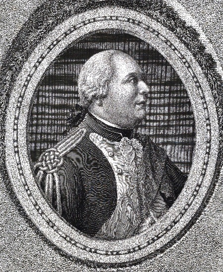 Karl Christian von Nassau-Weilburg (1735-1788), Stich von Karl Matthias Ernst (1758-1830)